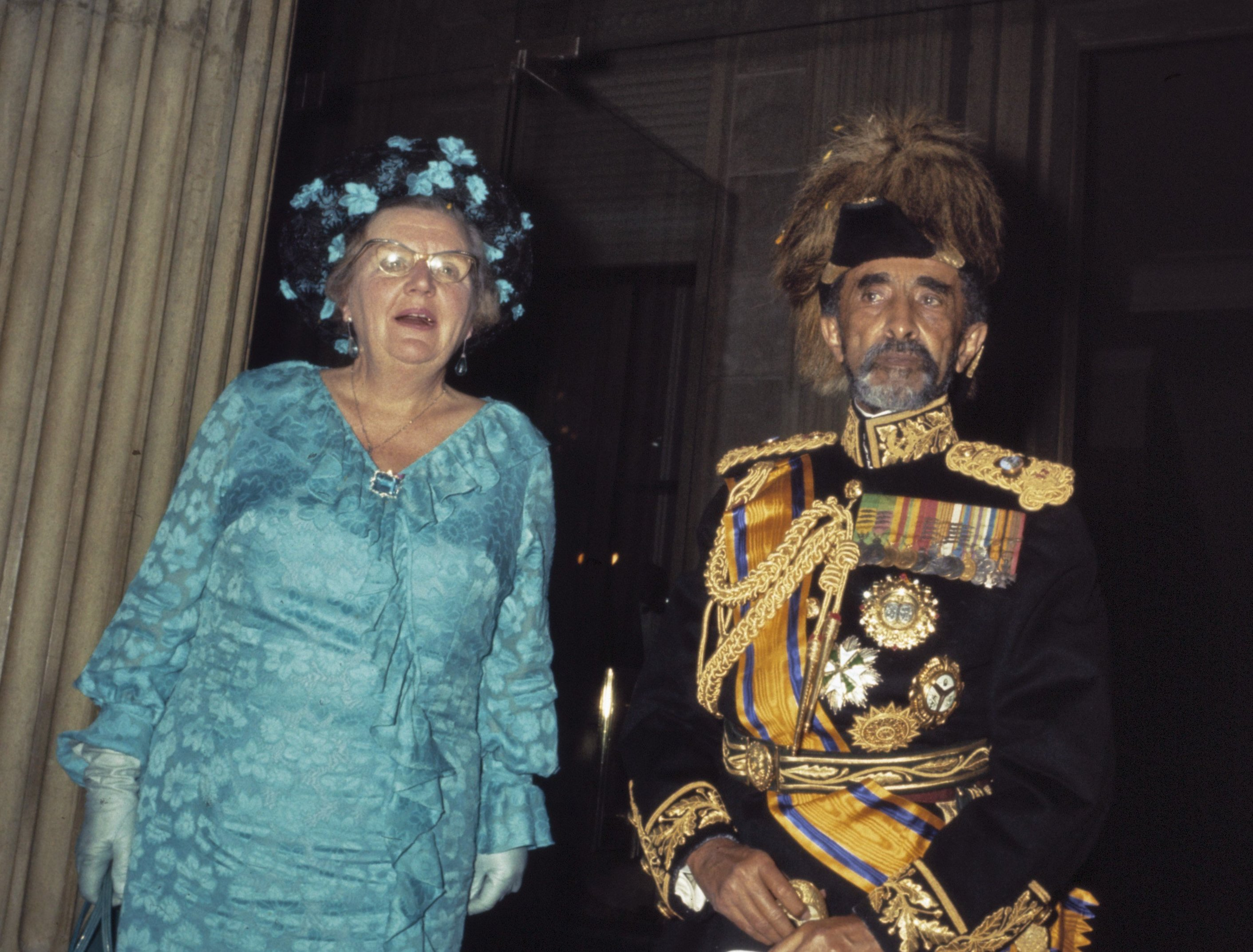 Collectie / Archief : Fotocollectie Anefo Reportage / Serie : [ onbekend ] Beschrijving : Koningin Juliana en Haile Selassie tijdens staatsbezoek Datum : januari 1969 Locatie : Ethiopië Trefwoorden : keizers, koninginnen, staatsbezoeken, uniformen Persoonsnaam : Haile Selassie (keizer Ethiopië), Juliana (koningin Nederland) Fotograaf : [onbekend] Auteursrechthebbende : Nationaal Archief Materiaalsoort : Dia (kleur) Nummer archiefinventaris : bekijk toegang 2.24.01.06 Bestanddeelnummer : 254-8270